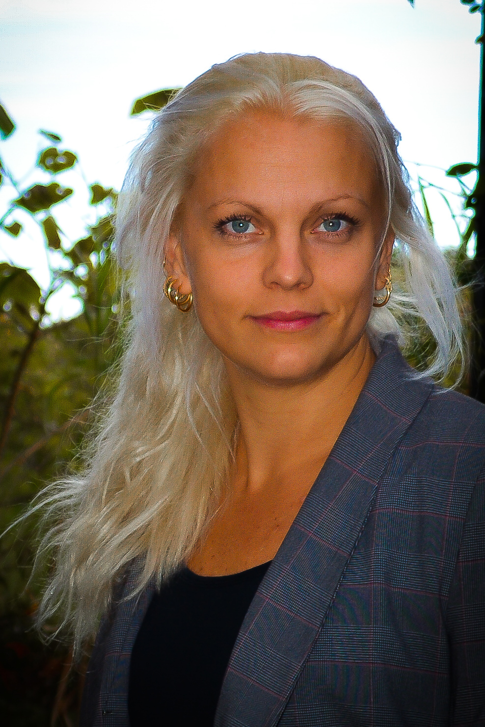 Emilie Pilthammar. Privat bild som får användas.